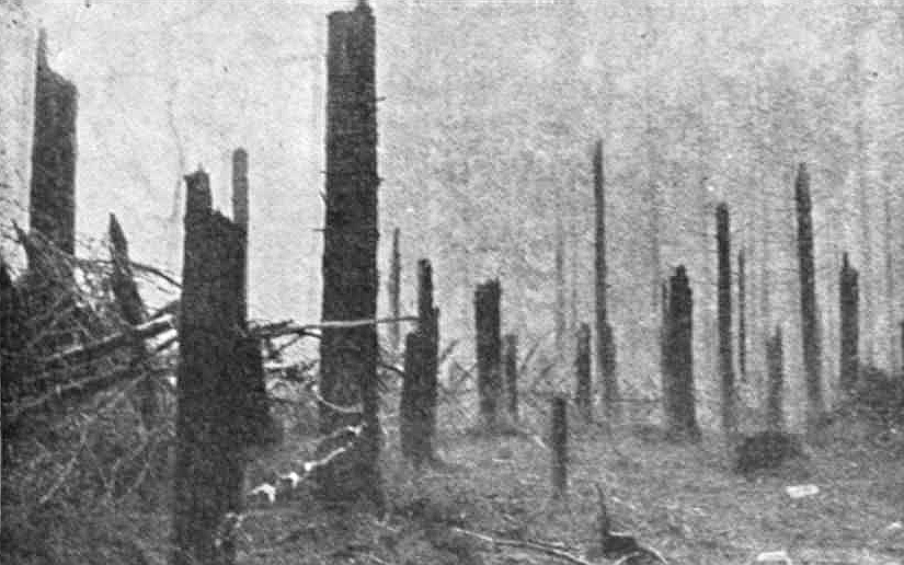 D - Batalia de la Oituz Padurea Vranceanu dupa bombardament Kiritescu II 38